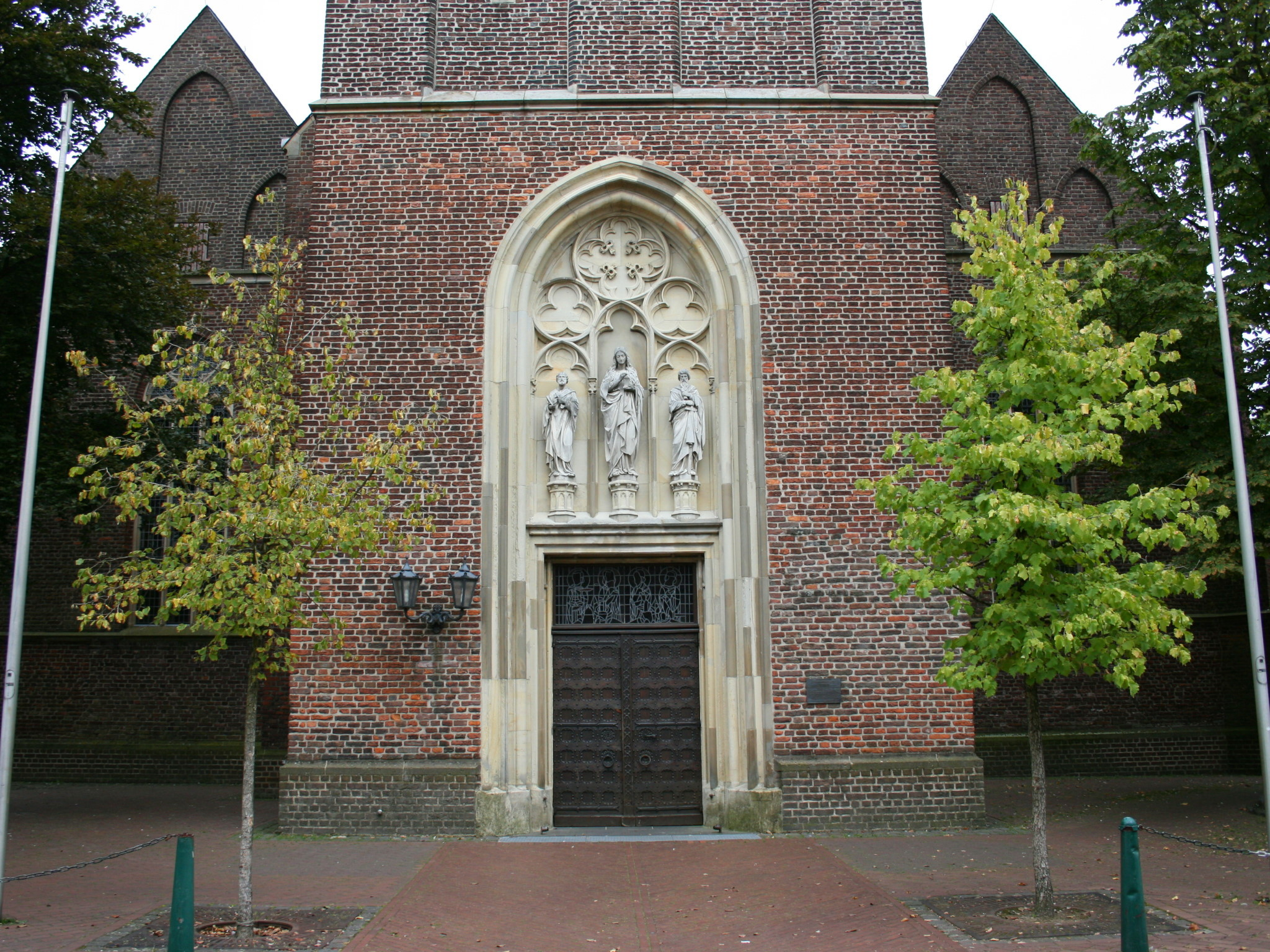 Sankt Maria Magdalena in Sonsbeck